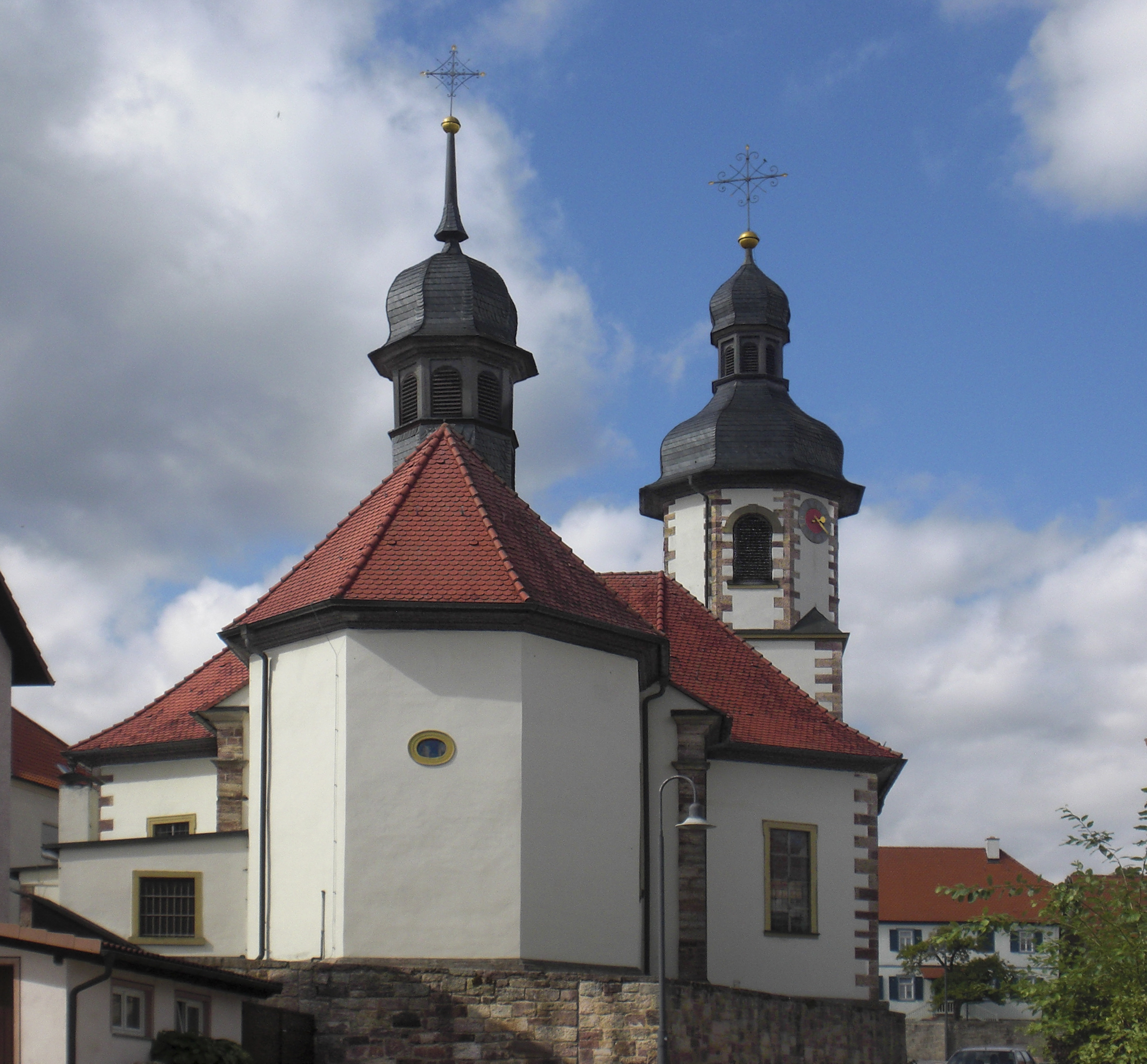 St.-Sebastian-Kirche in Stangenroth